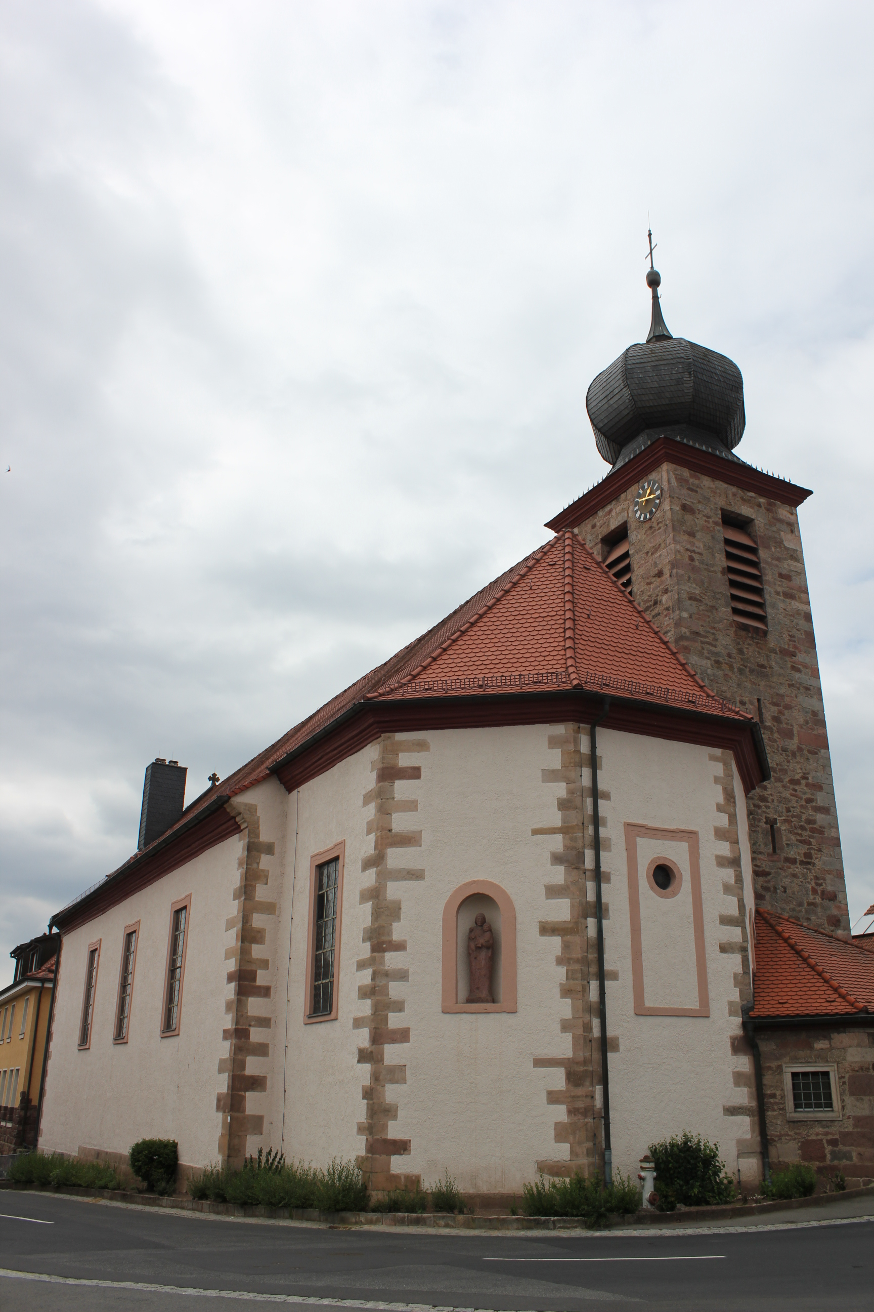 Katholische Kirche St. Josef in Waldberg